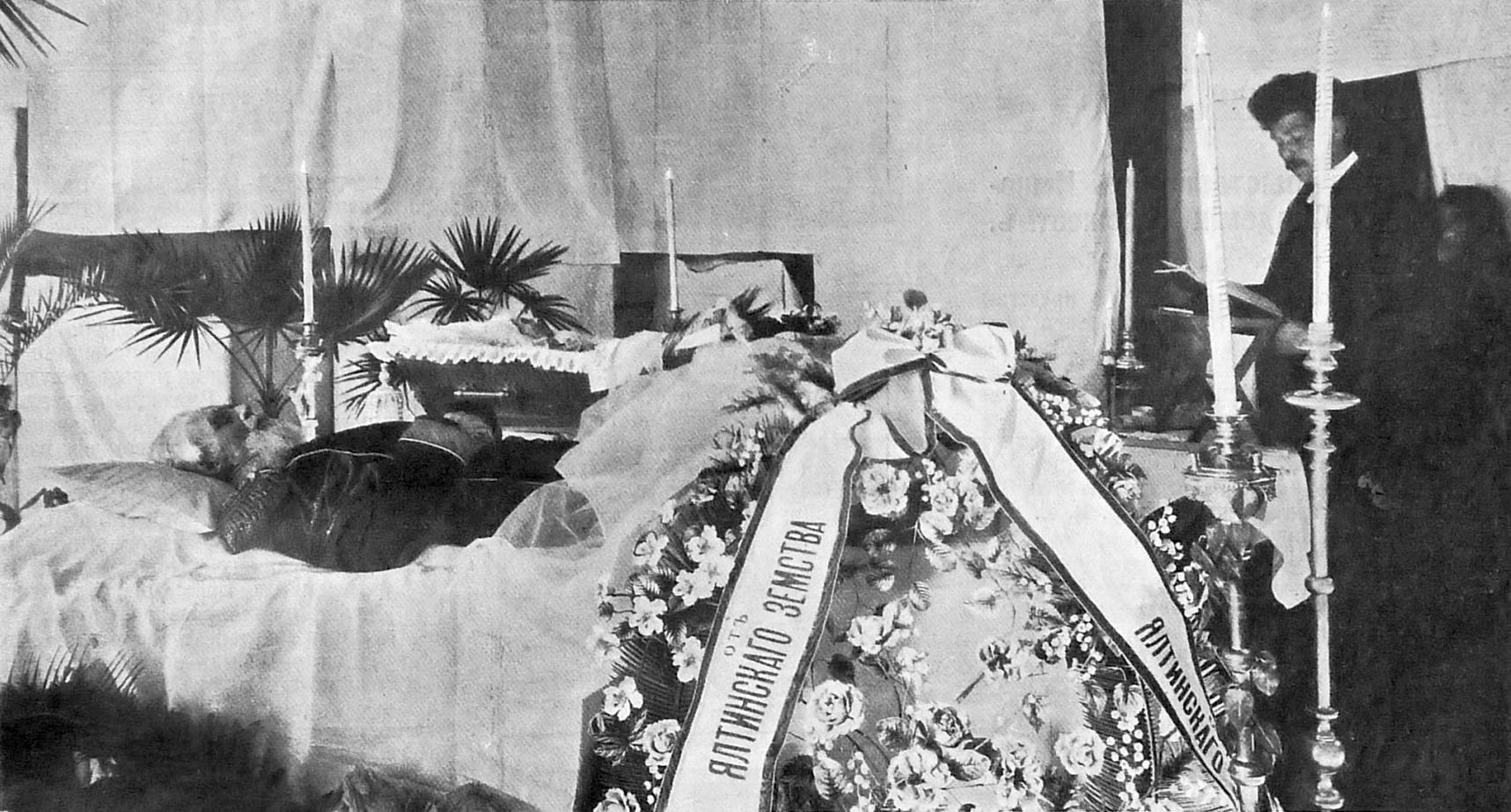 Фельдмаршал граф Д.А. Милютин на смертном одре. Рядом покоится в гробу умершая за несколько дней до своего мужа графиня Н.М. Милютина, похороненная вместе с мужем 3 февраля 1912 г., в семейном склепе в Новодевичьем монастыре, в Москве